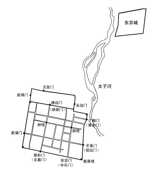 辽阳城及后金东京城 由维基人kallgan创作于2003年7月17日